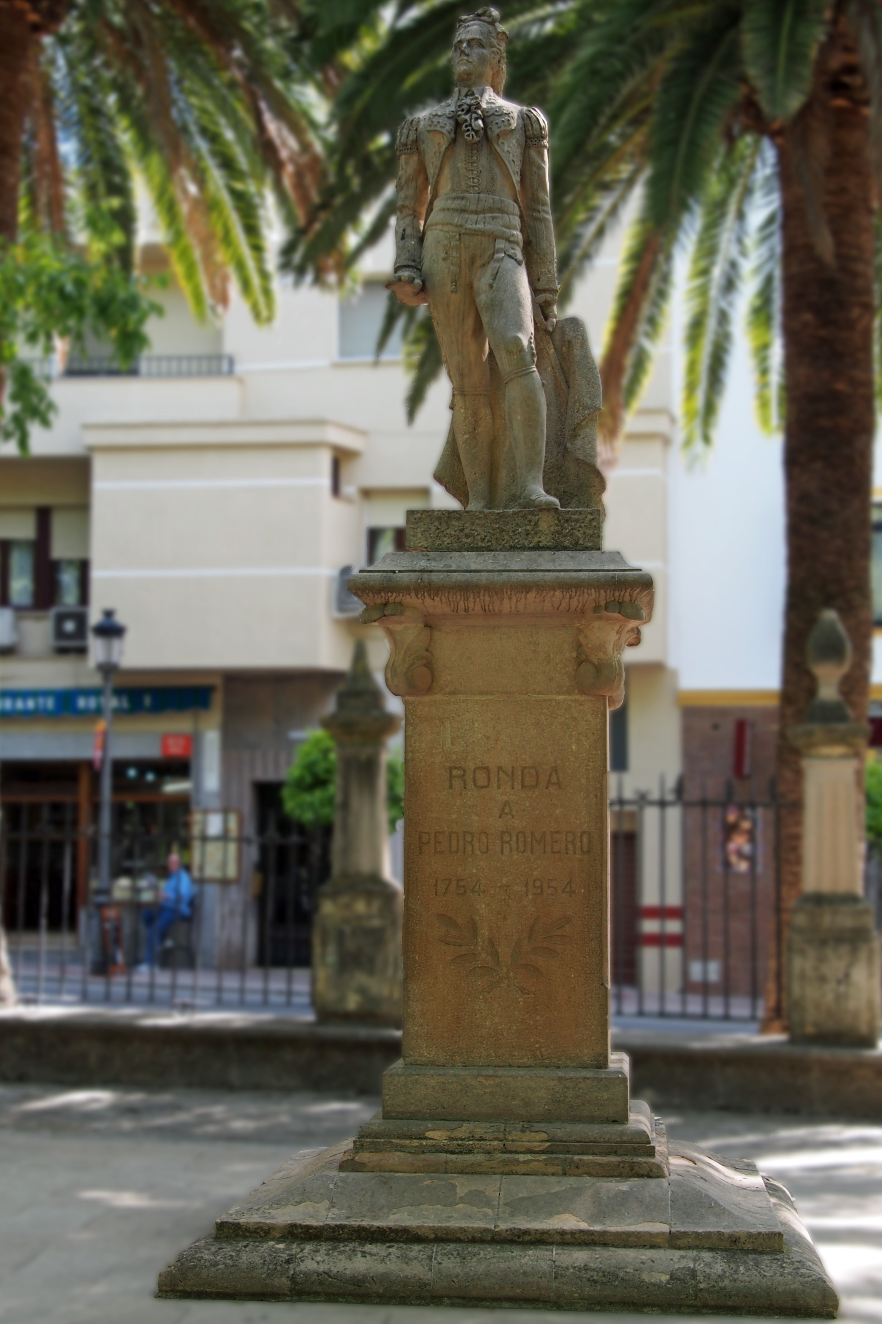 Denkmal von Pedro Romero (1754-1839) im Stadtpark "Alameda del Tajo" in Ronda